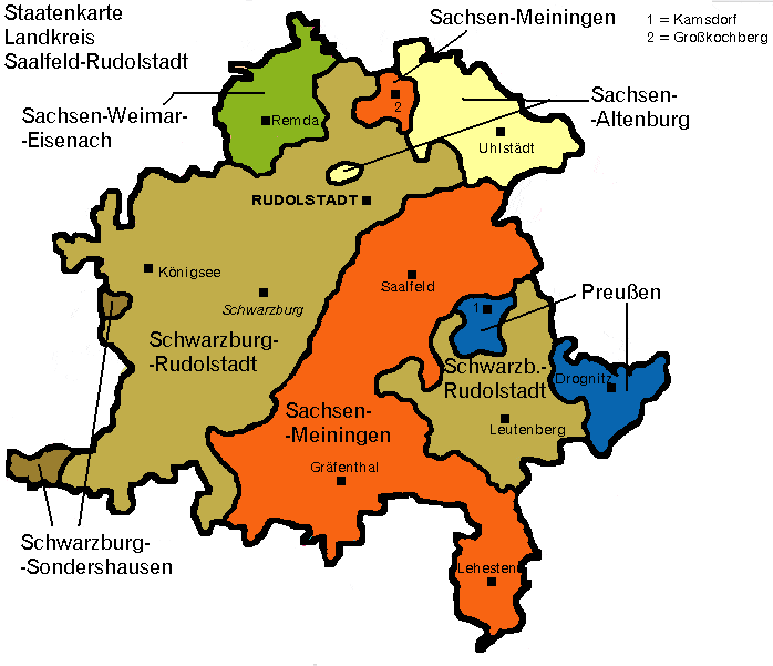 Staatenkarte des Landkreis Saalfeld-Rudolstadt, Aufteilung bis 1922.